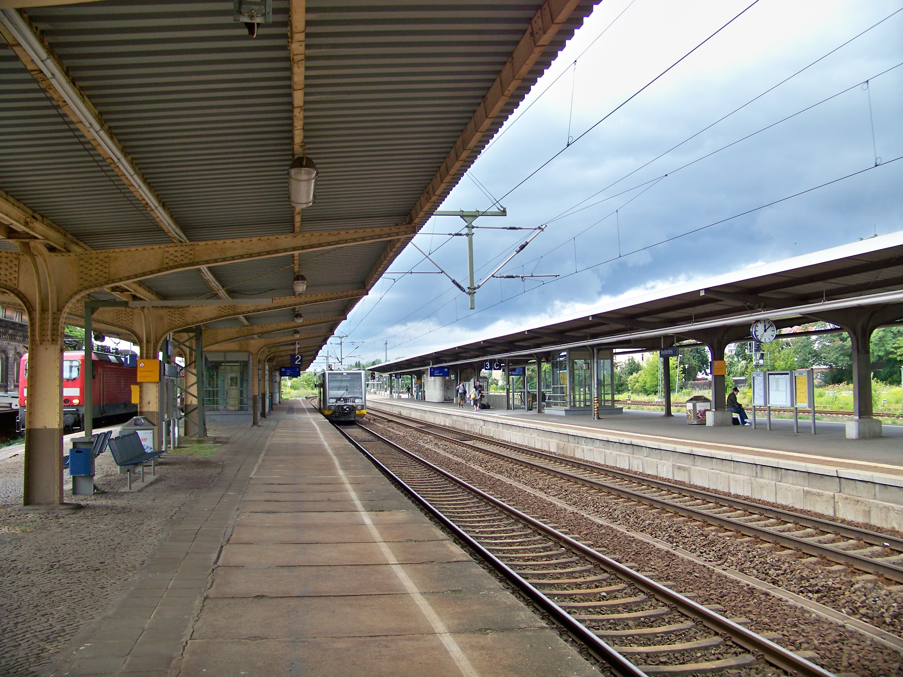 Bahnsteige des Bahnhofs Weißenfels